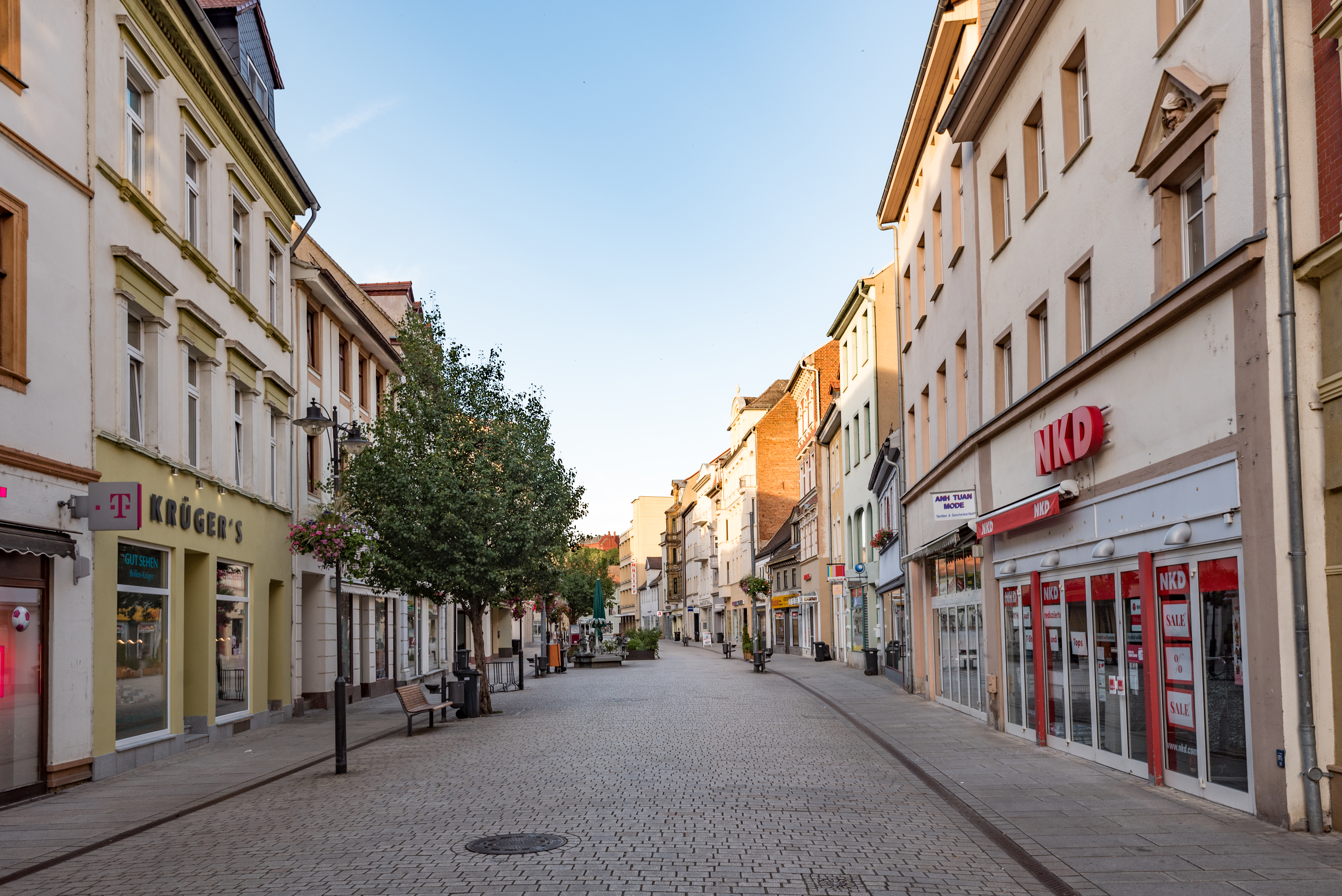 Weißenfels, Jüdenstraße, Ansicht von Westen